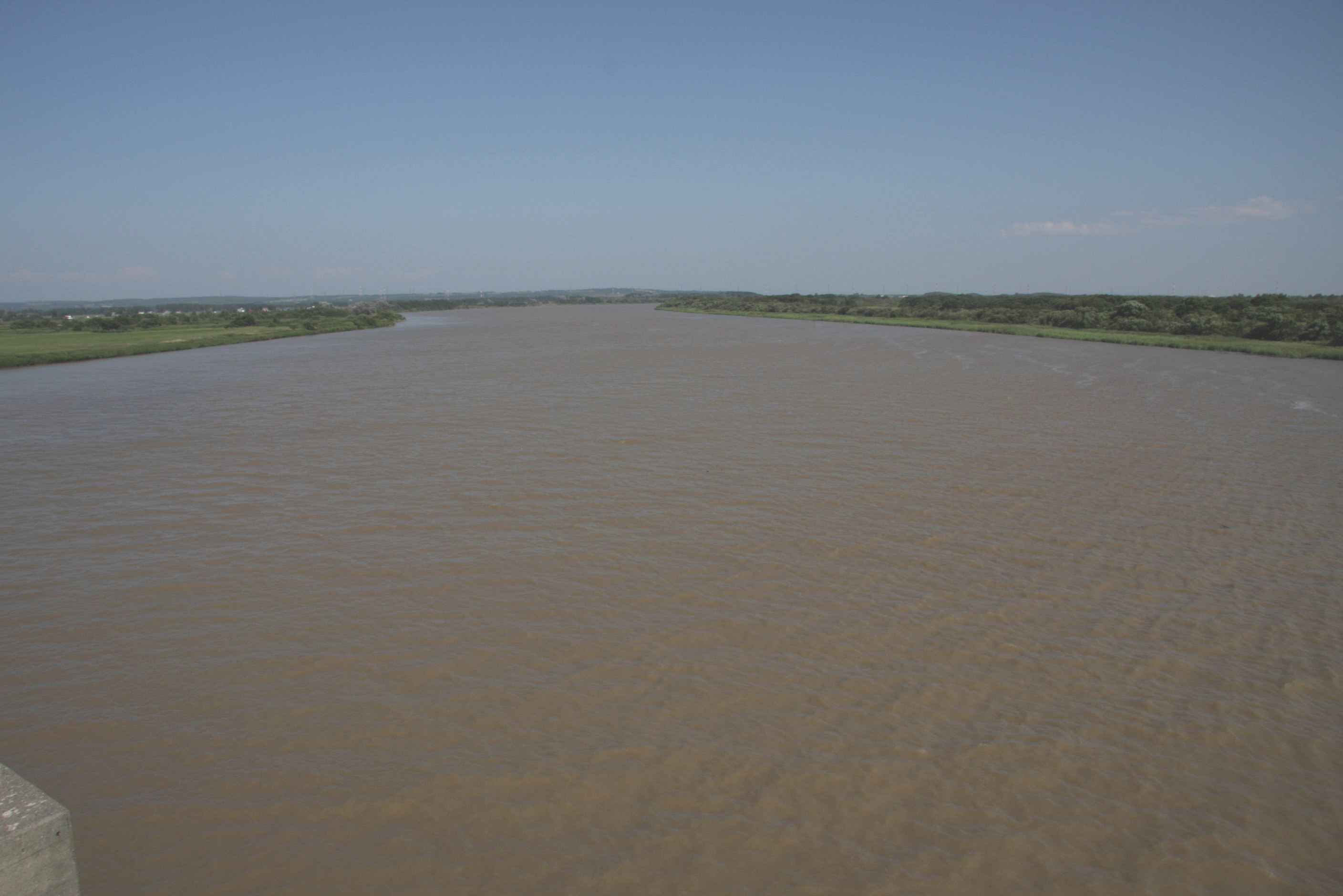 石狩川 石狩河口橋（国道231号）より上流を望む